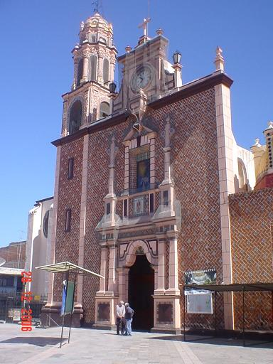 Parroquia de San Martín Texmelucan